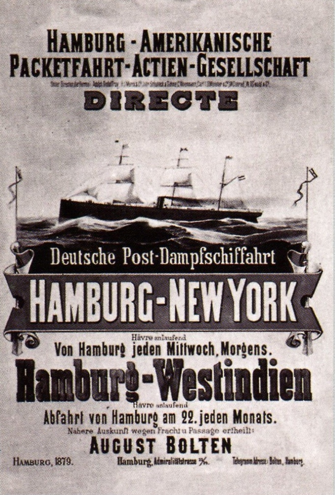 Plakat der Reederei HAPAG von 1879